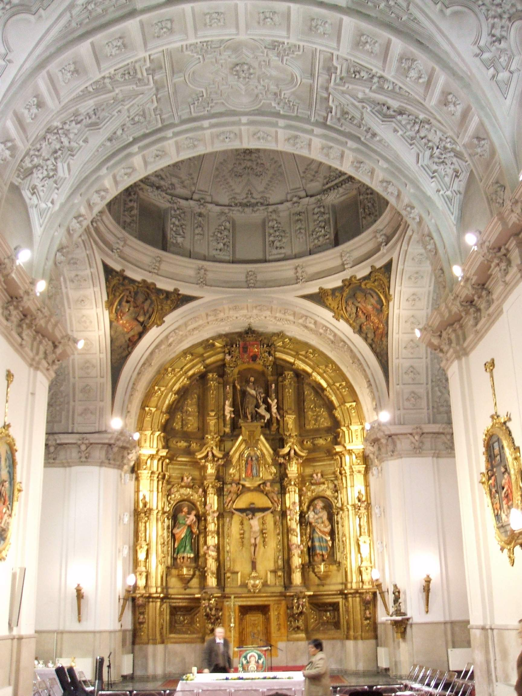 Valladolid - Iglesia de San Juan de Letrán (MM Carmelitas Descalzas)